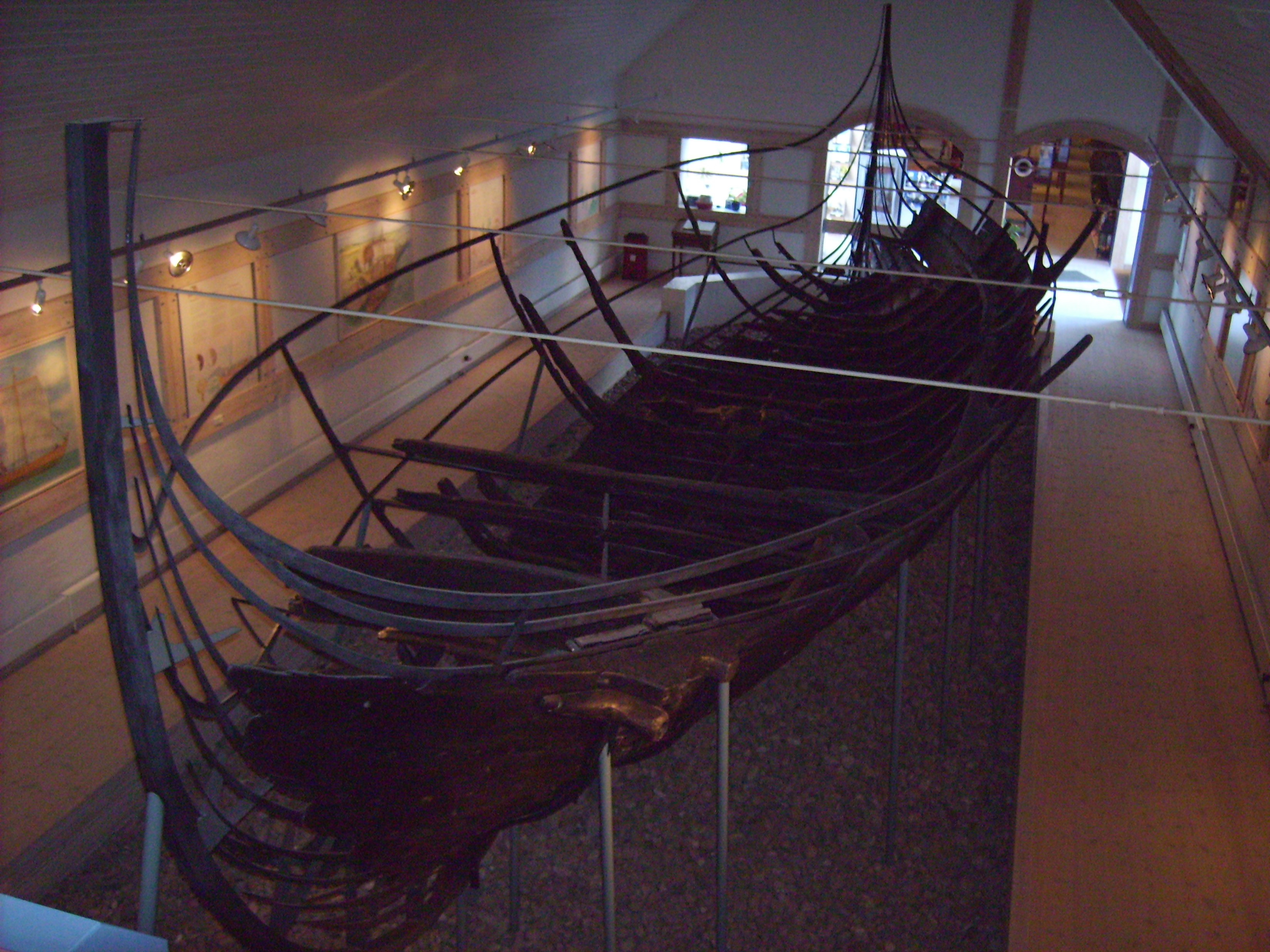 The Ellingå Ship (”Ellingåskibet” in Danish) in Bangsbo Museum in Frederikshavn, from 1163 is built like a Viking Age ship (14 x 3,5 meter).